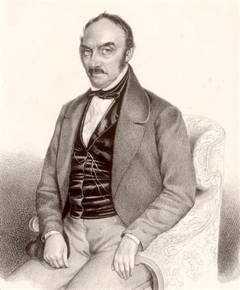 Regens Chori beim Kirchenmusikverein zu St. Martin in Preßburg